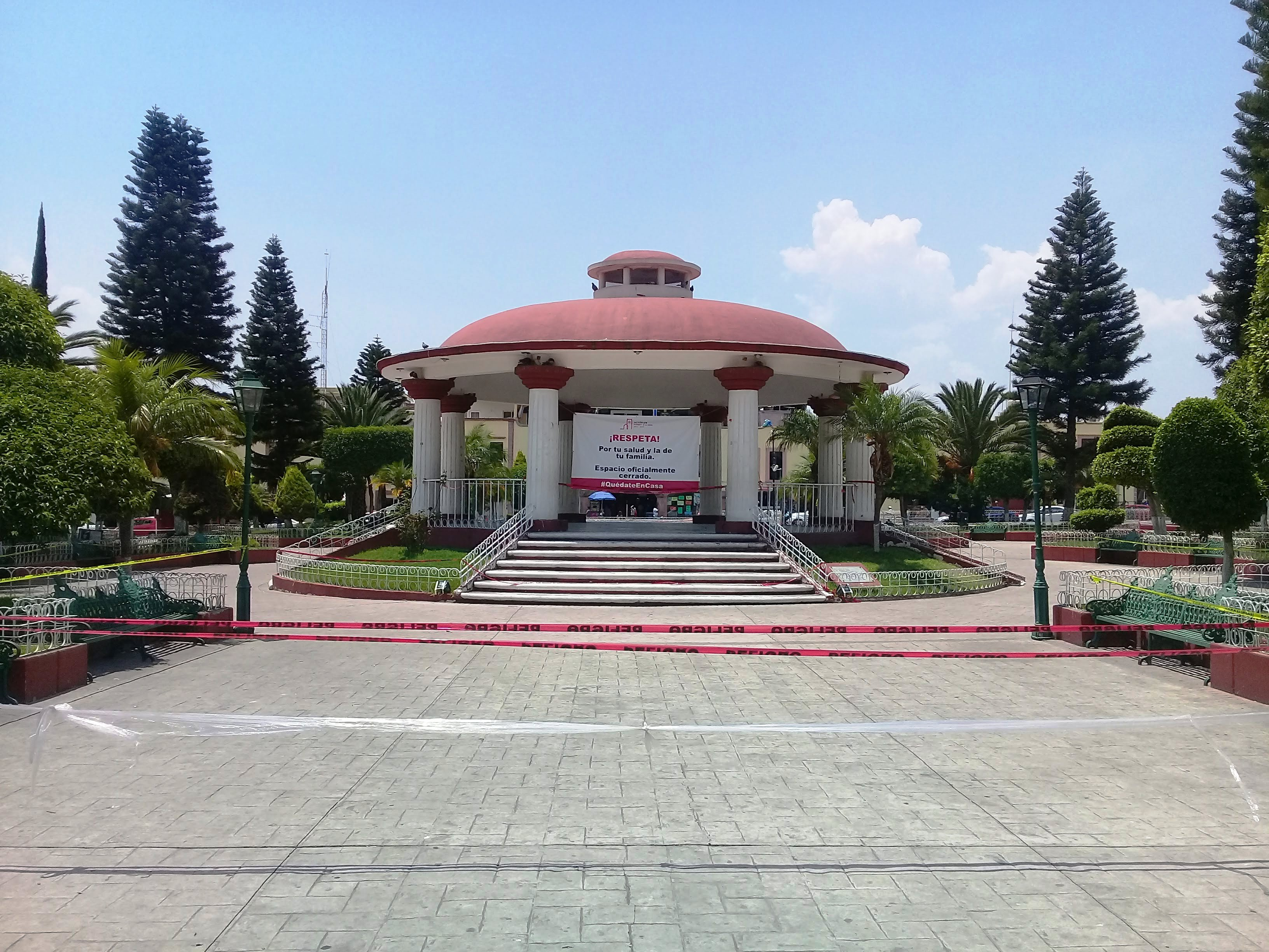 Espacios públicos cerrados en Actopan, Hidalgo; por la pandemia de enfermedad por COVID-19 en México.